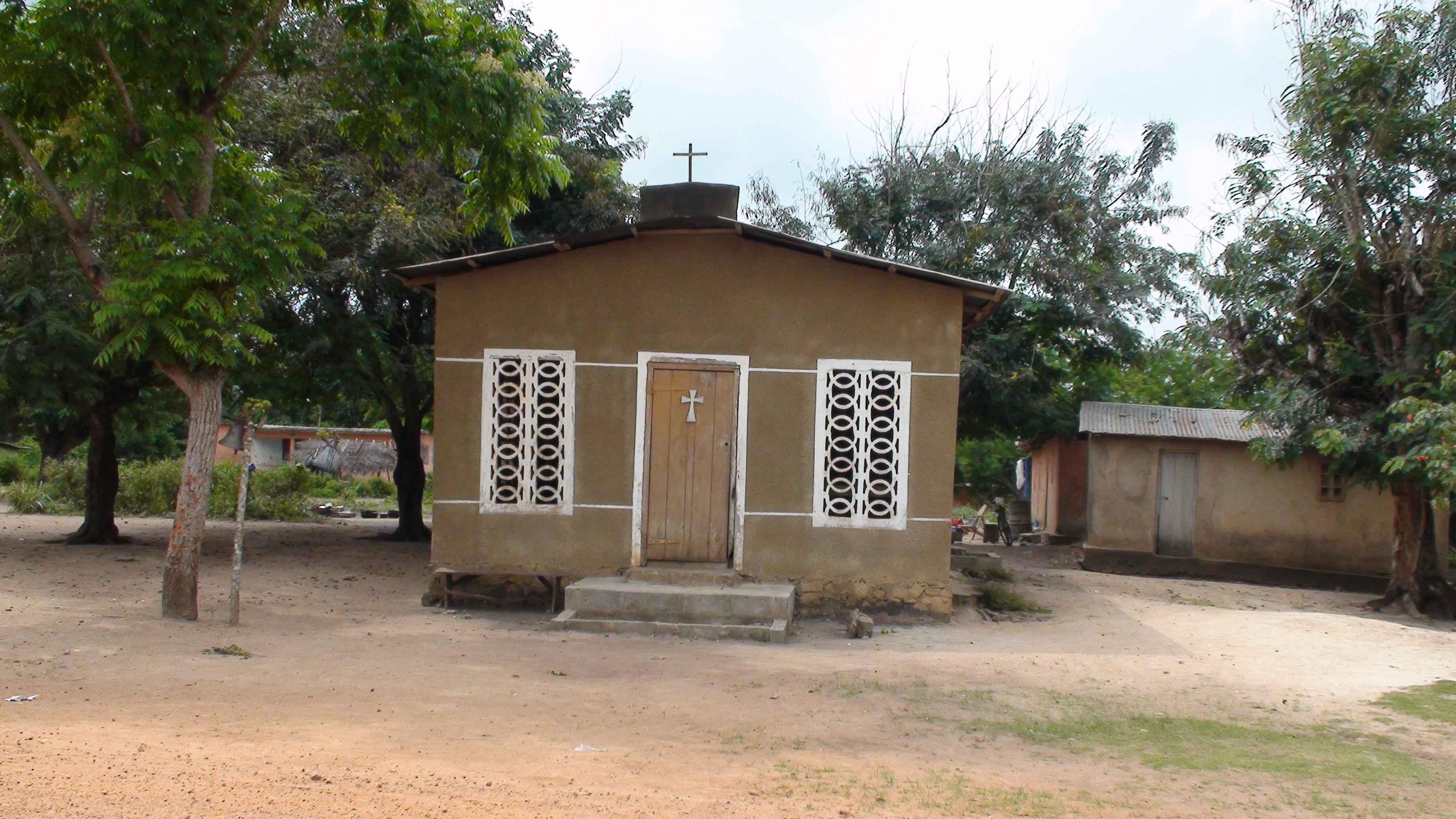 La chapelle catholique Sainte Jeanne-d'arc du village de Taboitien